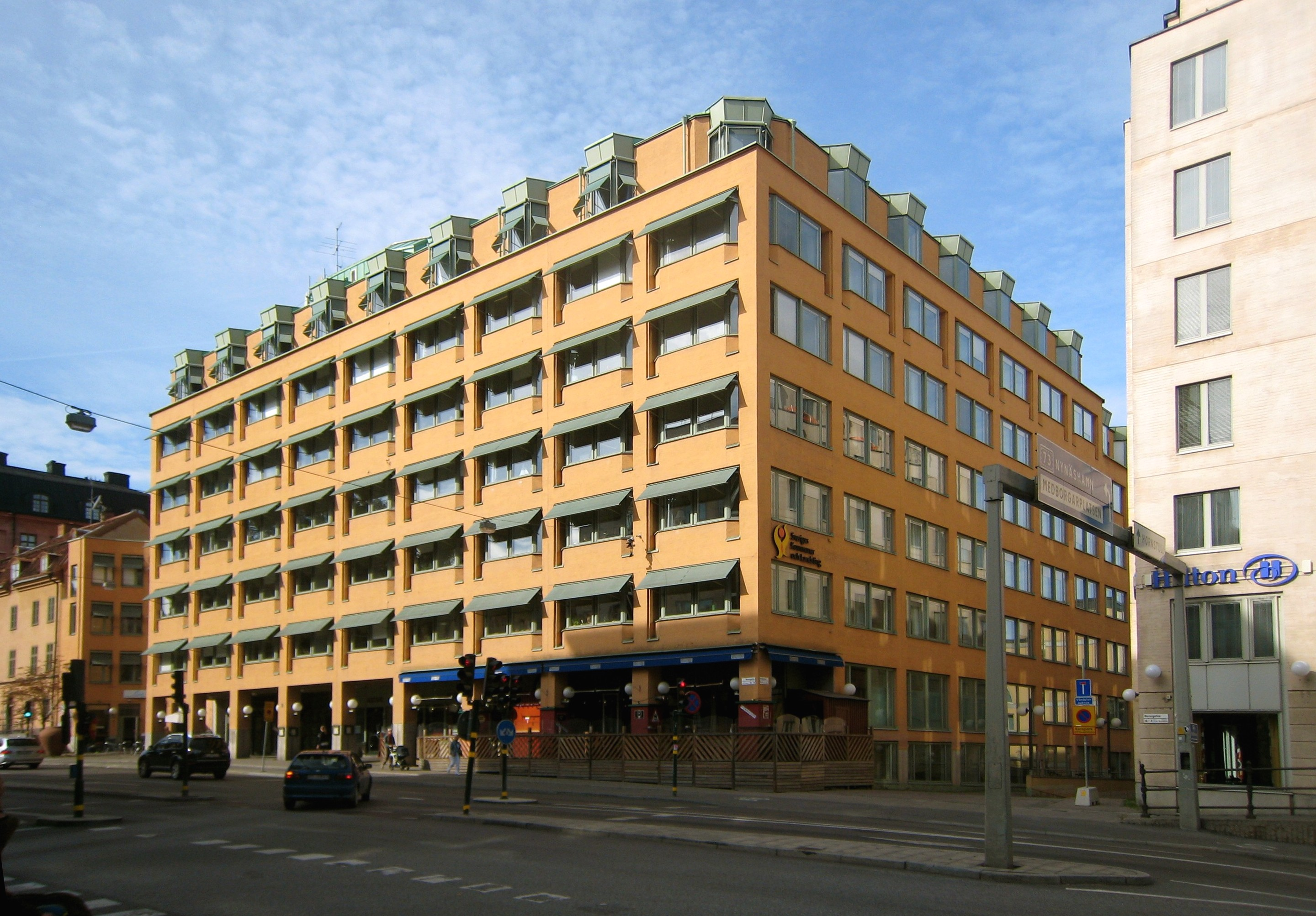 Landstingsförbundets hus.